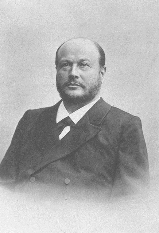 Max Heinrich Runge, deutscher Gynäkologe und Geburtshelfer (1888-1909)